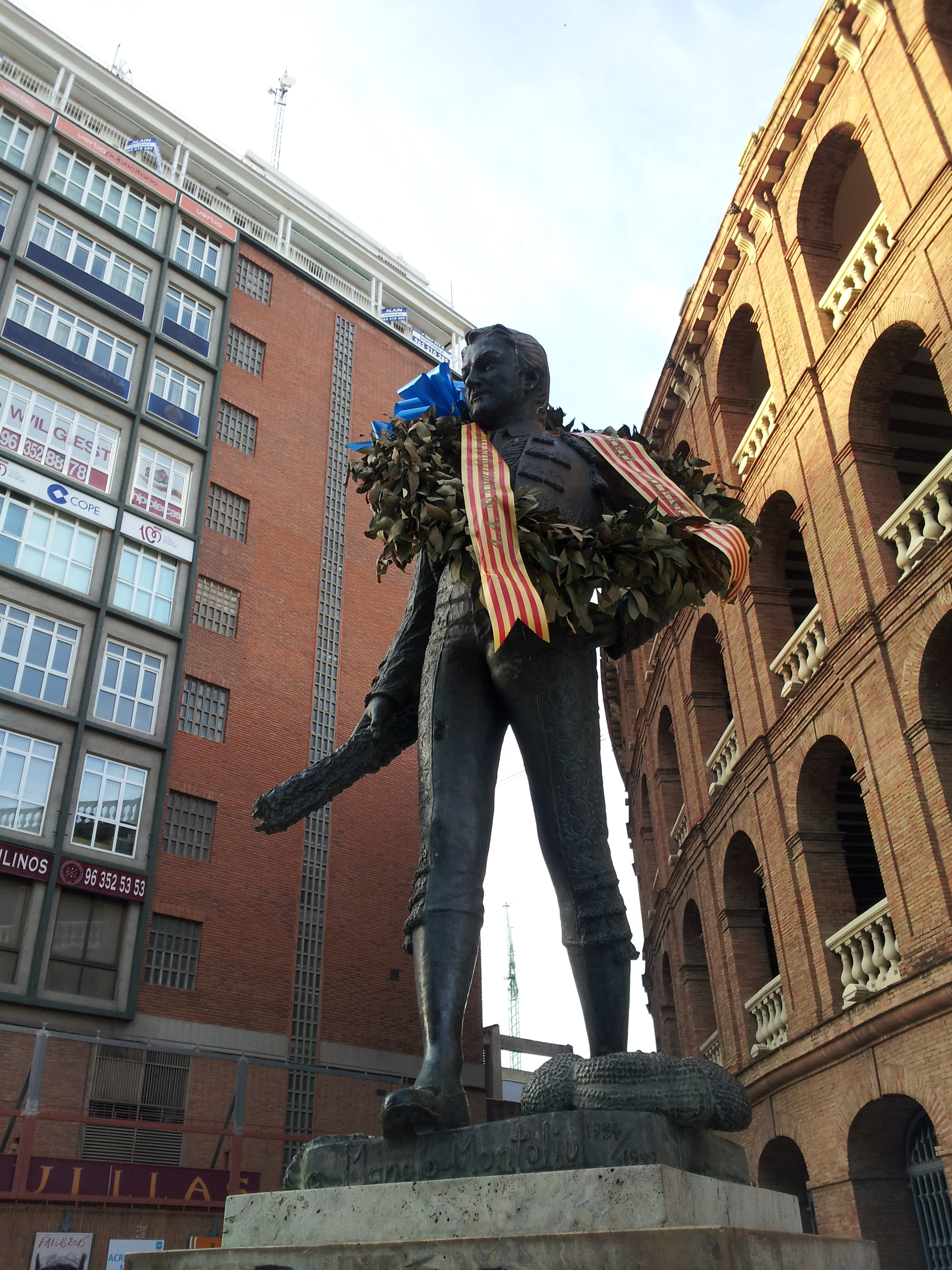 Plaça de bous de València